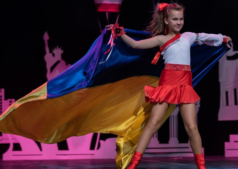 Little Miss & Mister United World Talant 2018 (Greece)